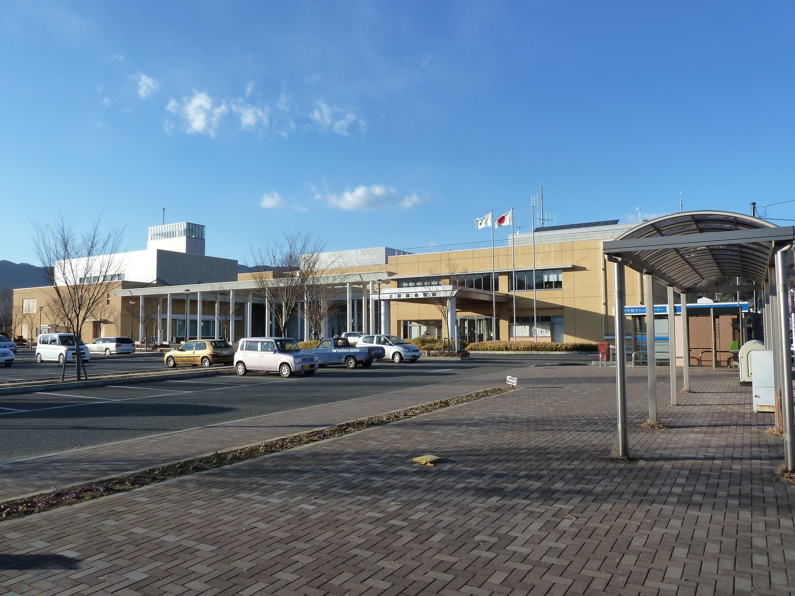 上野原市役所